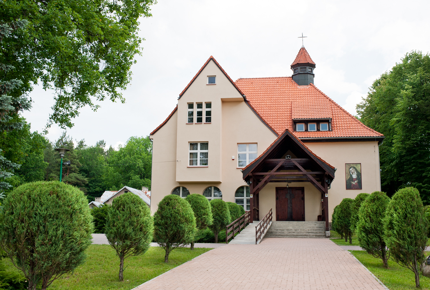 zespół kościoła parafialnego pw. Matki Boskiej Ostrobramskiej (kościół i plebania) Ruciane-Nida, Ruciane-Nida (miasto)